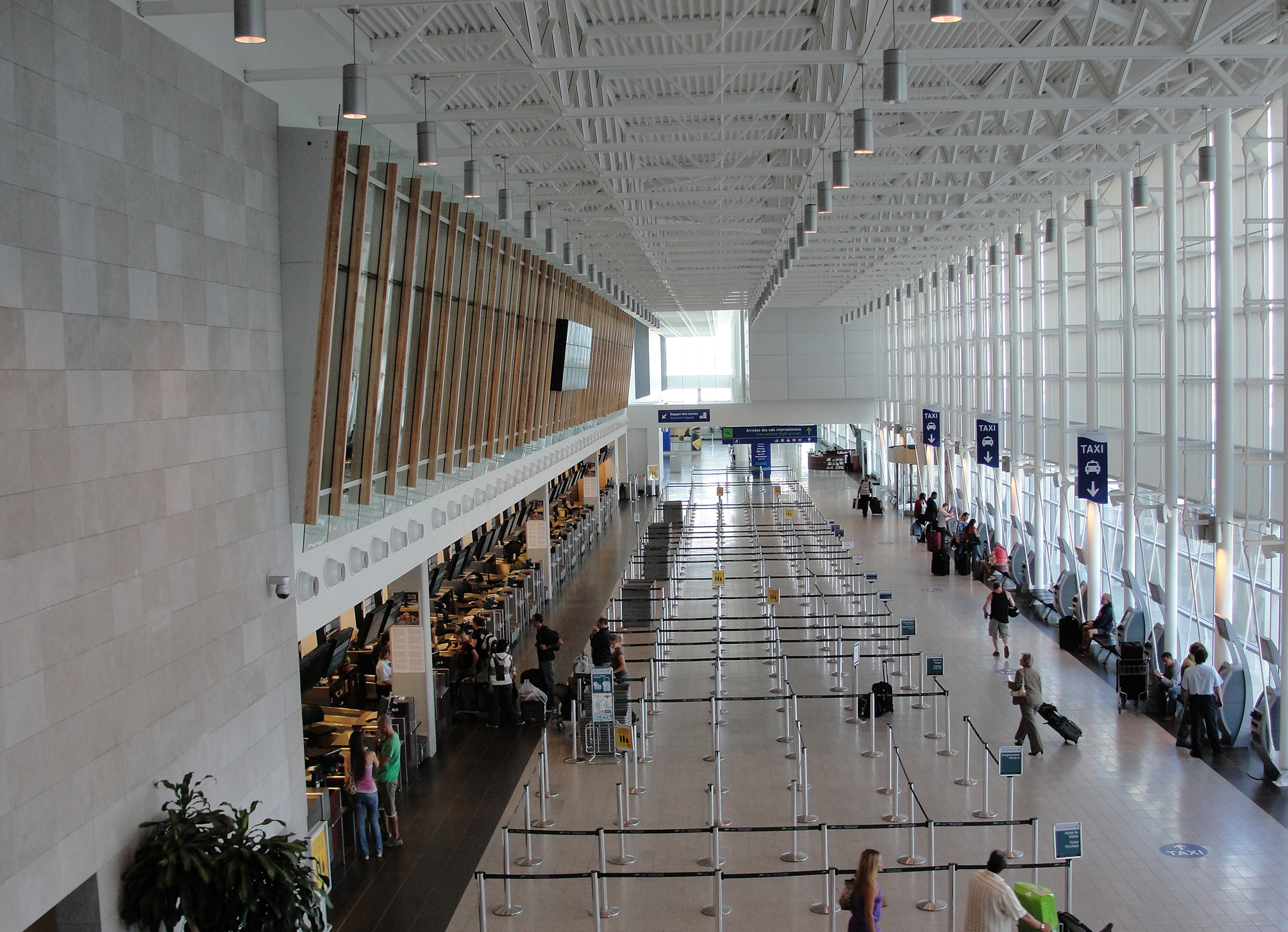 Aéroport international Jean-Lesage - Intérieur 2012